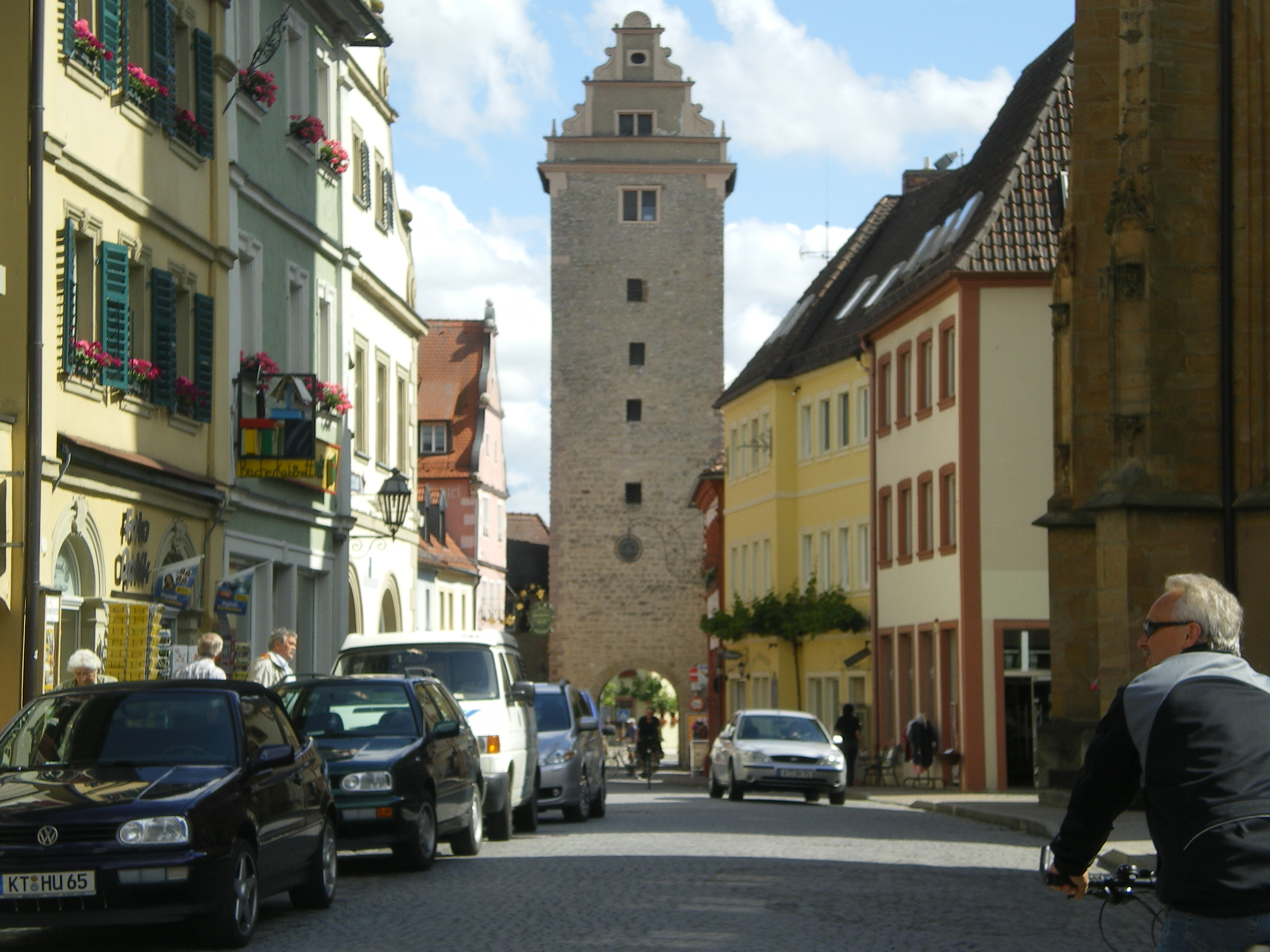 Oberes (Sommeracher) Tor in Volkach